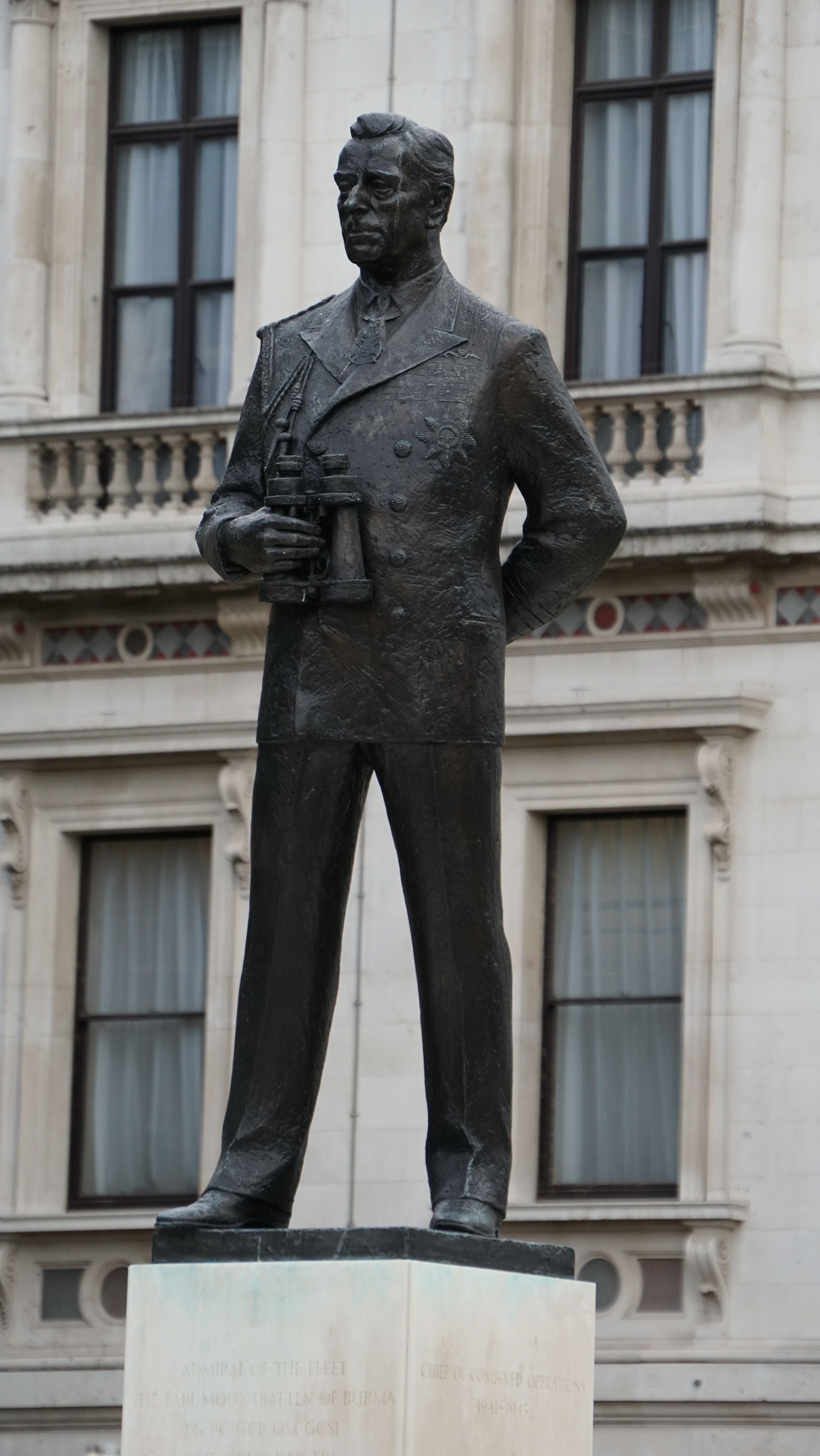 A little visit in London Une petite visite a Londres